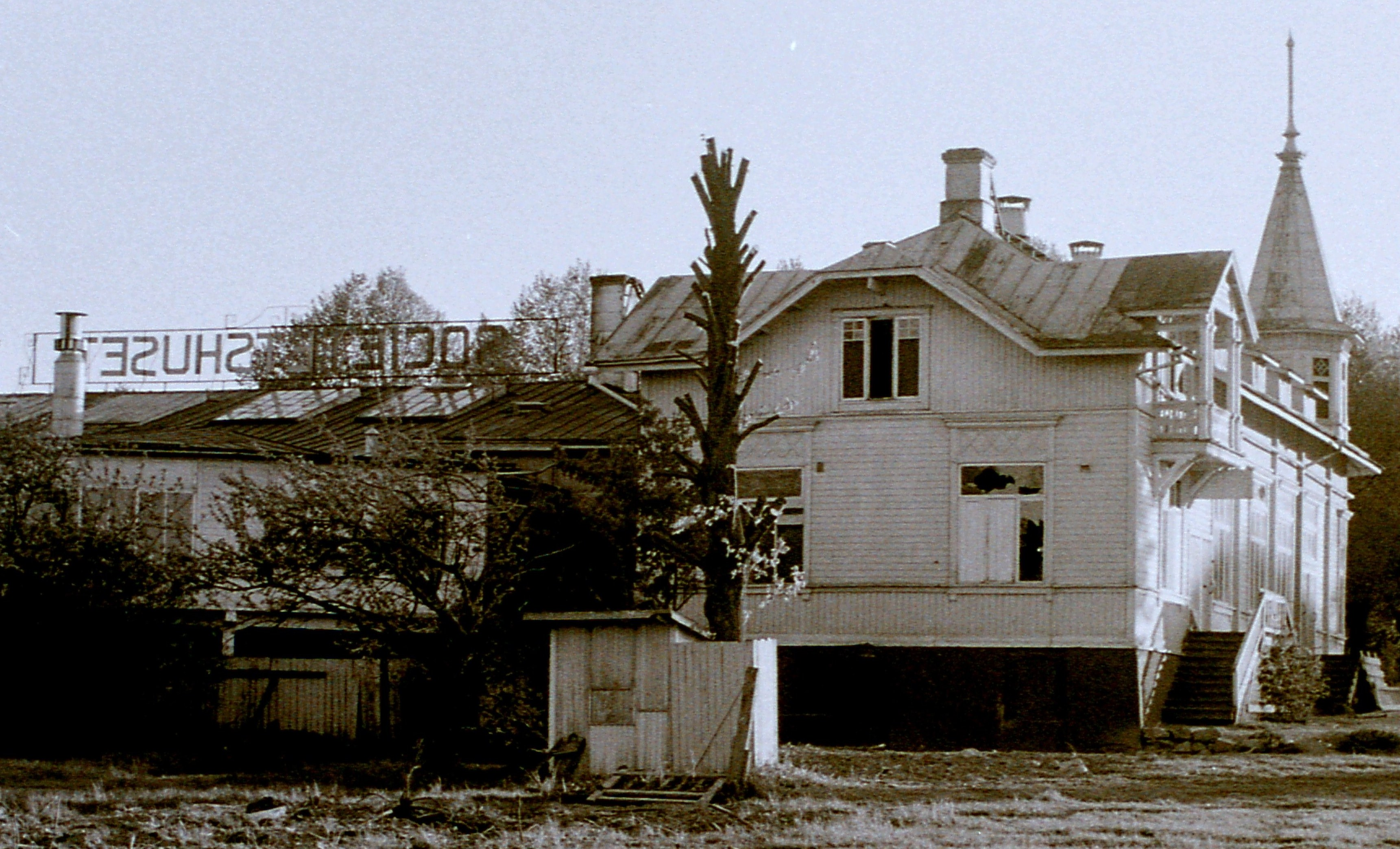 Foto 1974